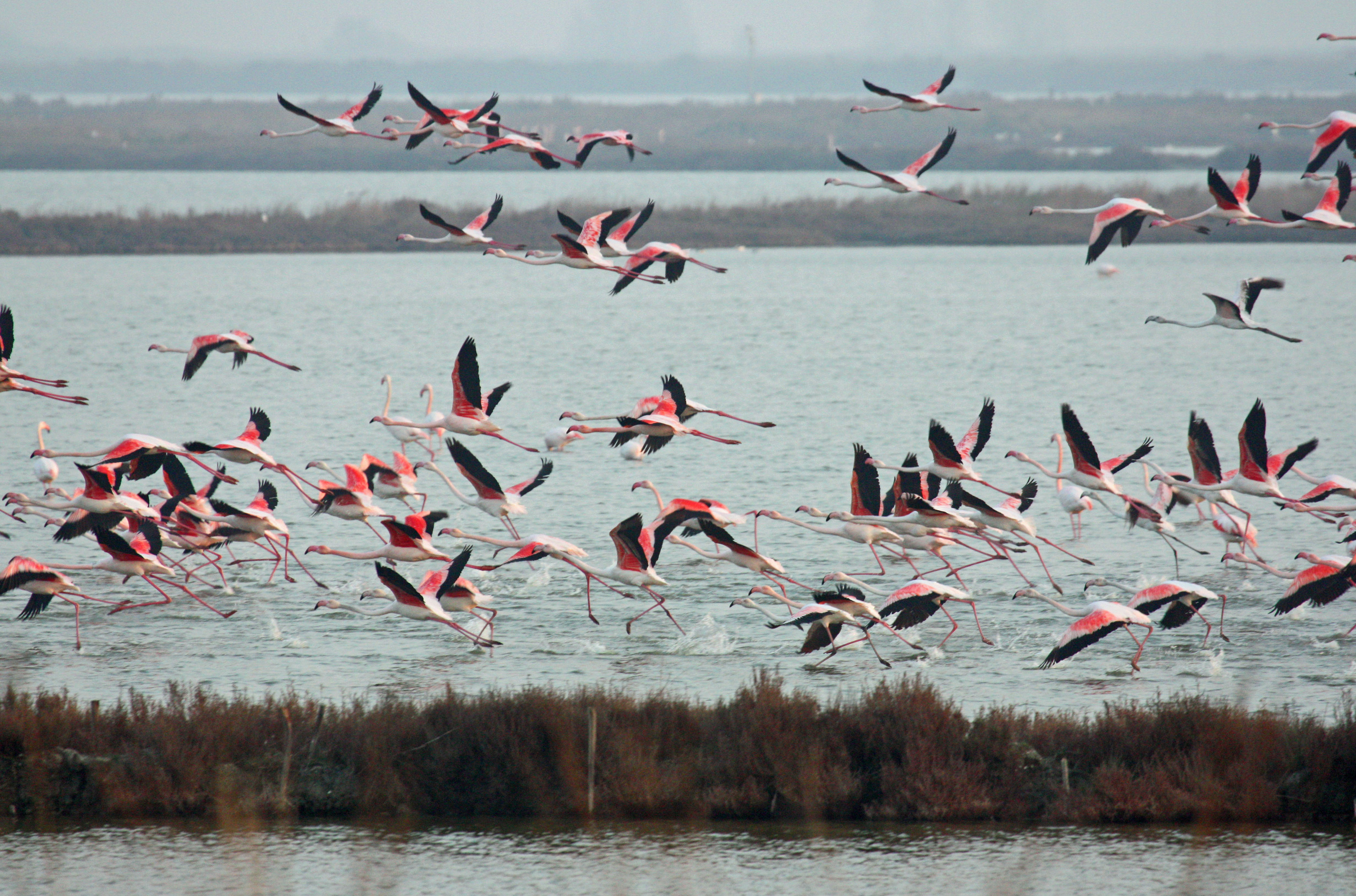 I fenicotteri rosa prendono il volo